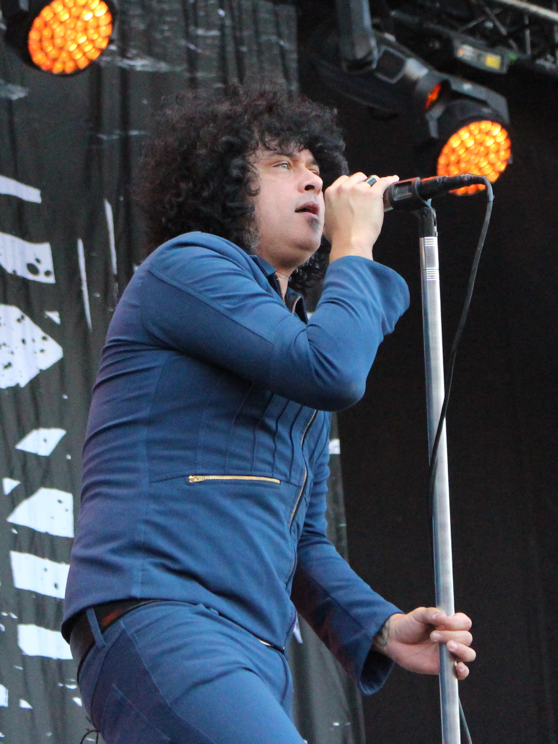 Festivalsommer This photo was created with the support of donations to Wikimedia Deutschland in the context of the CPB project "Festival Summer".